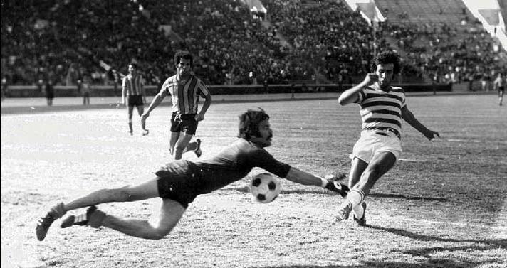 Moncef Khouini (Club africain) a marqué le seul but face à Mokhtar Gabsi (Espérance sportive de Tunis), derby terminé par 1-0